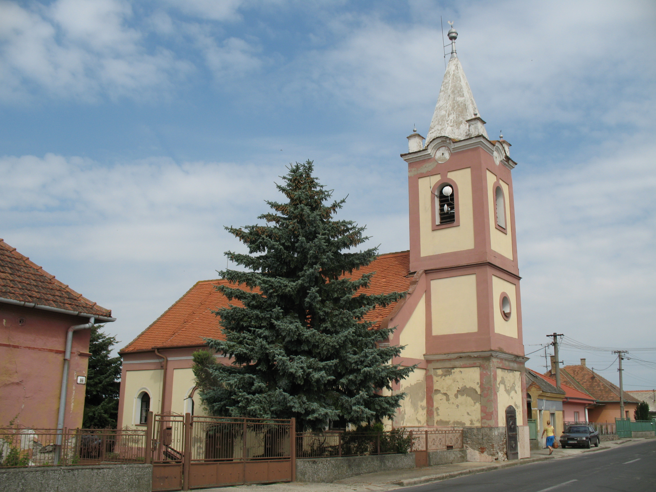 Padány